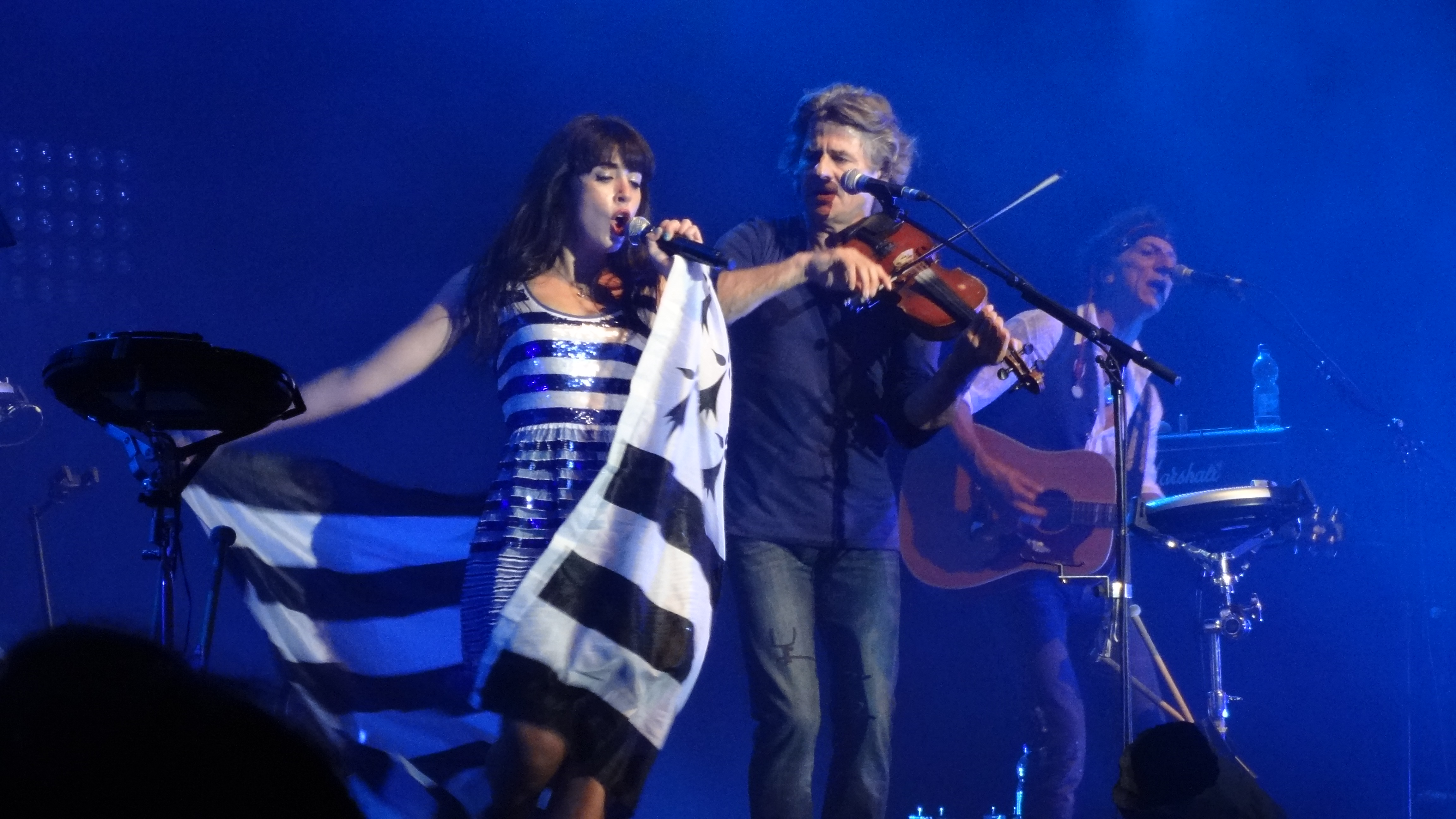 Nolwenn Leroy arborant le drapeau breton lors de son concert à la Foire aux Vins de Colmar en août 2012